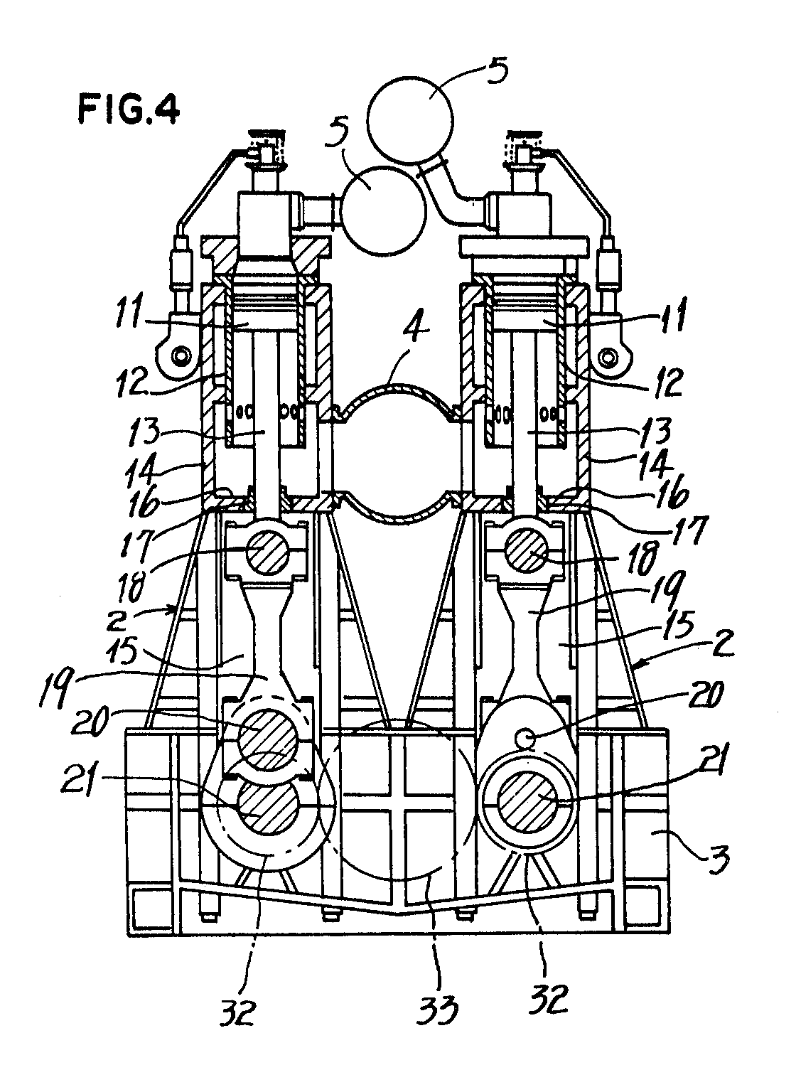 u engine